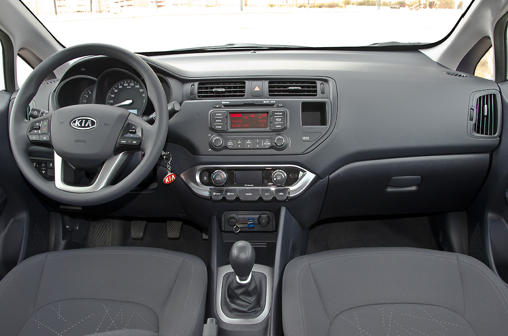 2012 Kia Rio 1.4 CRDi 90 hp 5-door